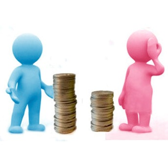 Representa a como les pagan a las mujeres